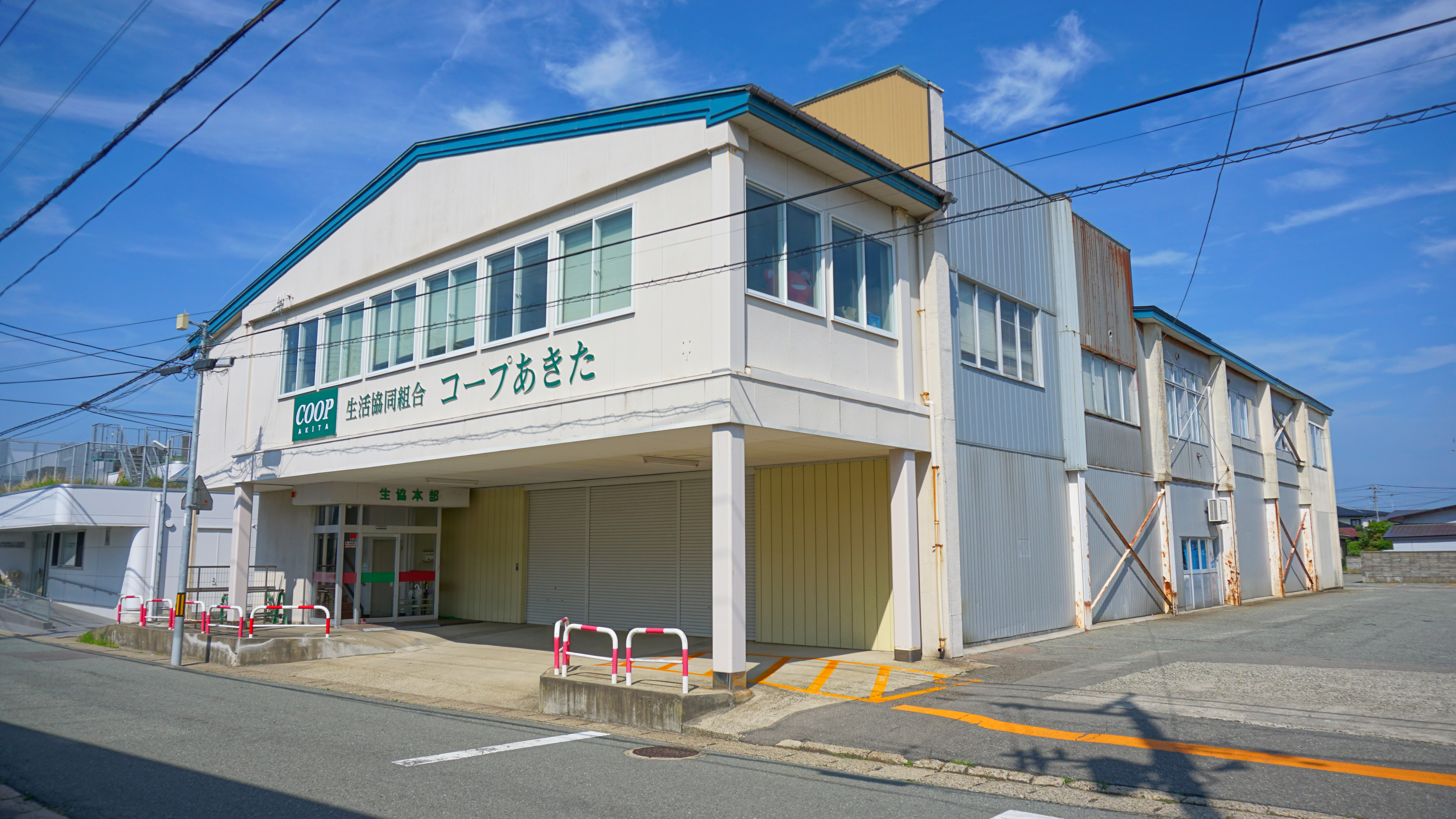 生活協同組合コープあきた本部